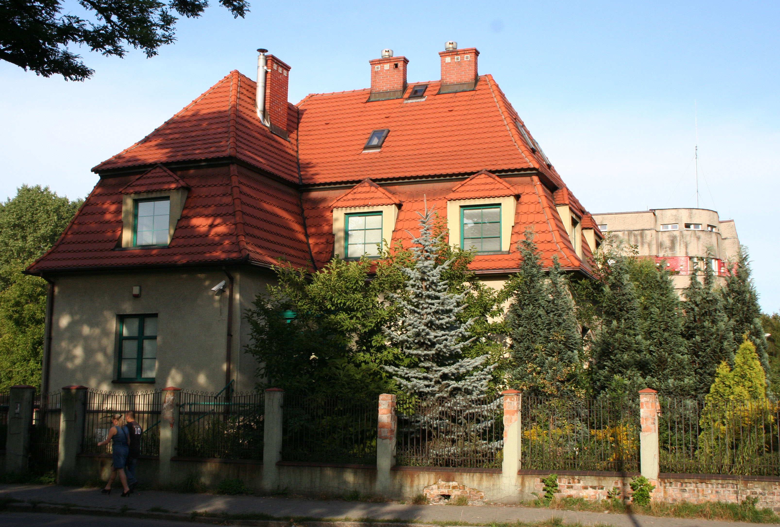 Katowice Szopienice. Zabytkowa willa na rogu Zamenhoffa i Kantorówny